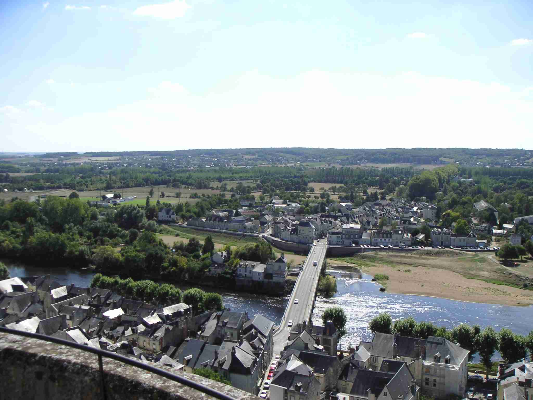 Image prise par LonganimE : vue des deux rives de la ville de Chinon (France) et de la Vienne (rivière)